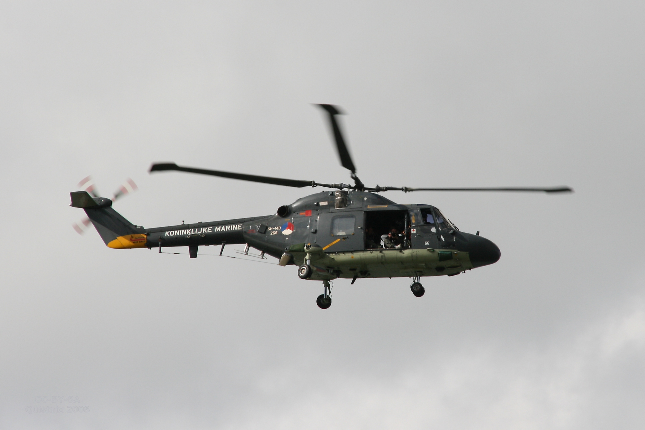 Westland Lynx van de Koninklijke Marine, vliegend boven Den Helder